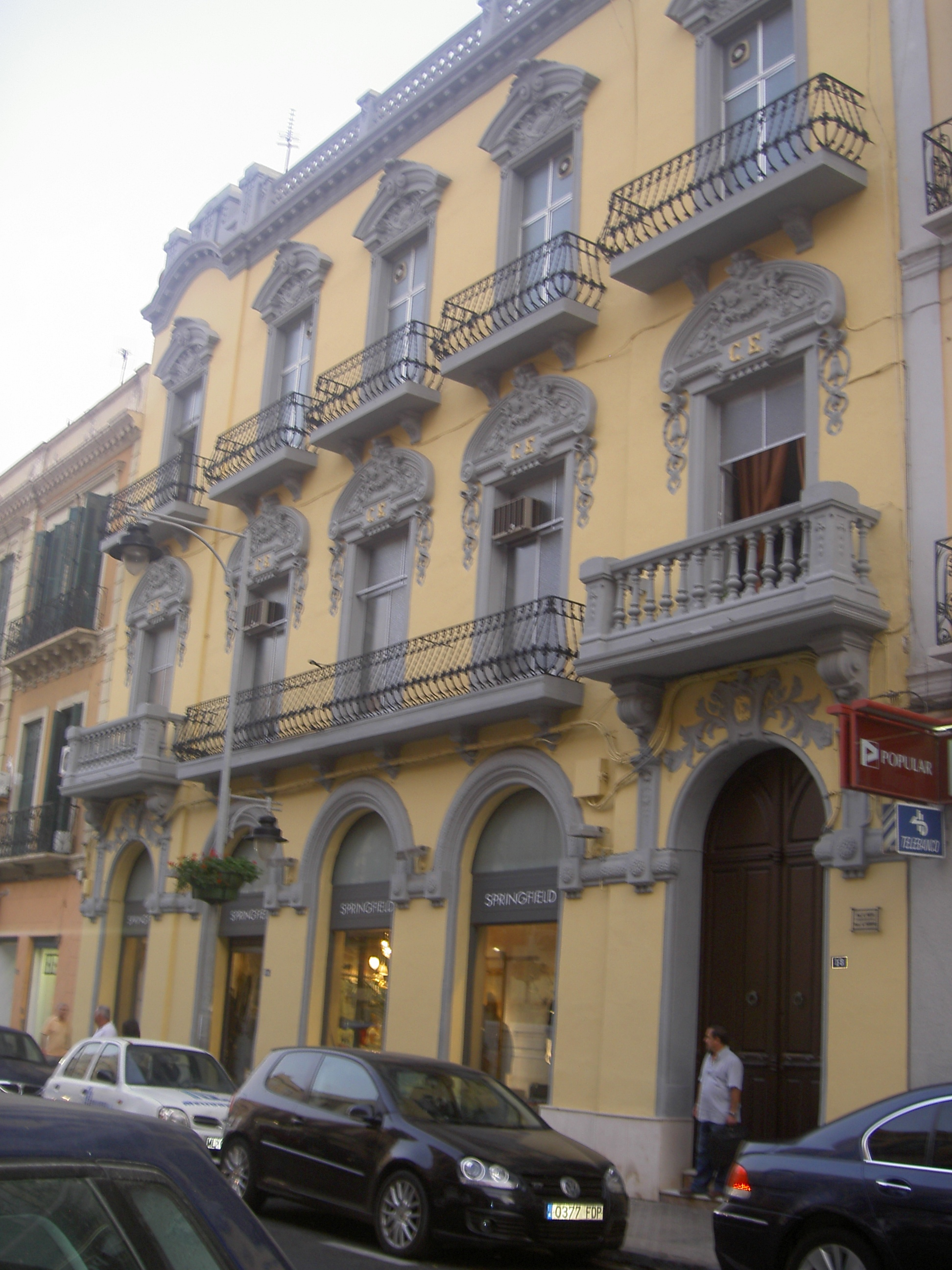 Fachada Casino Español